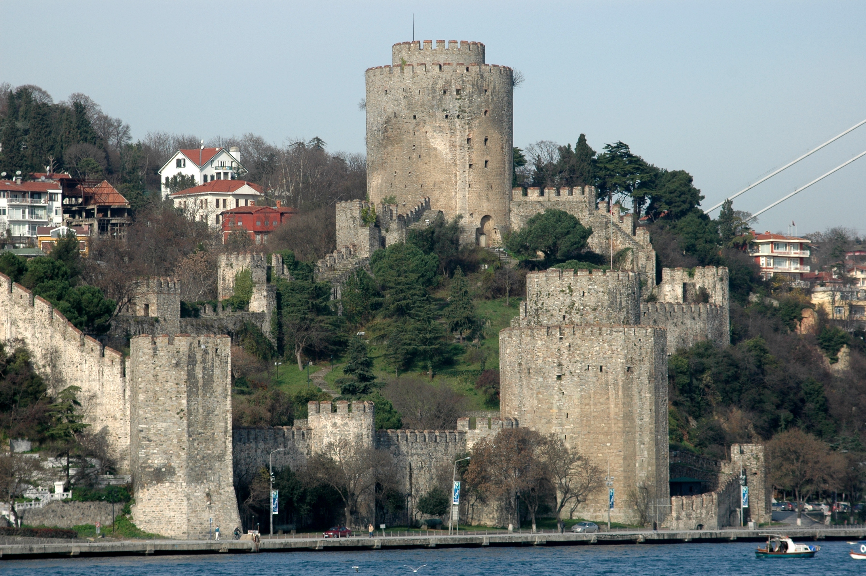 Istanbul - Fortalesa d'Europa